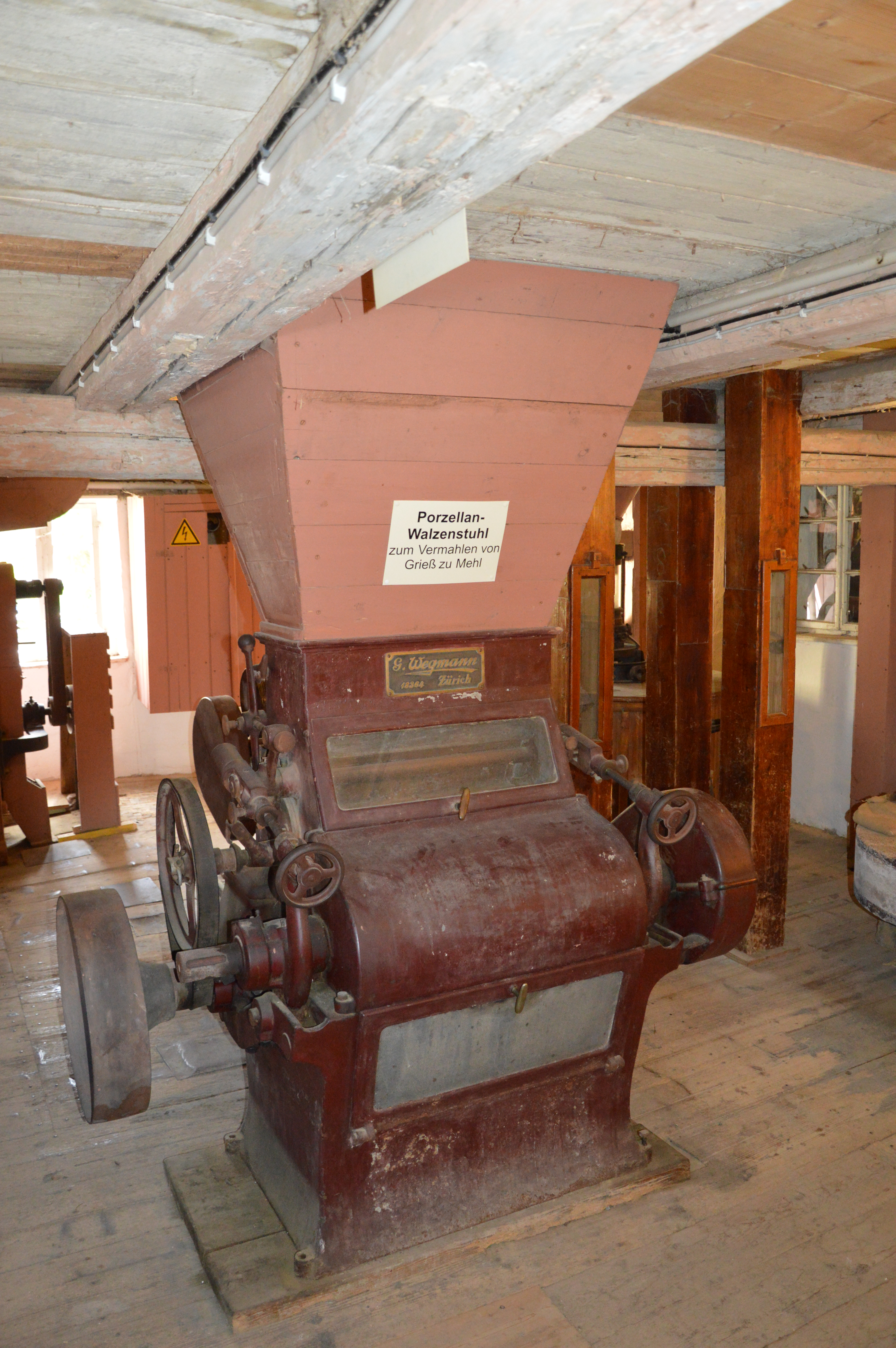 Porzellan-Walzenstuhl Wassermühle Klein Quenstedt